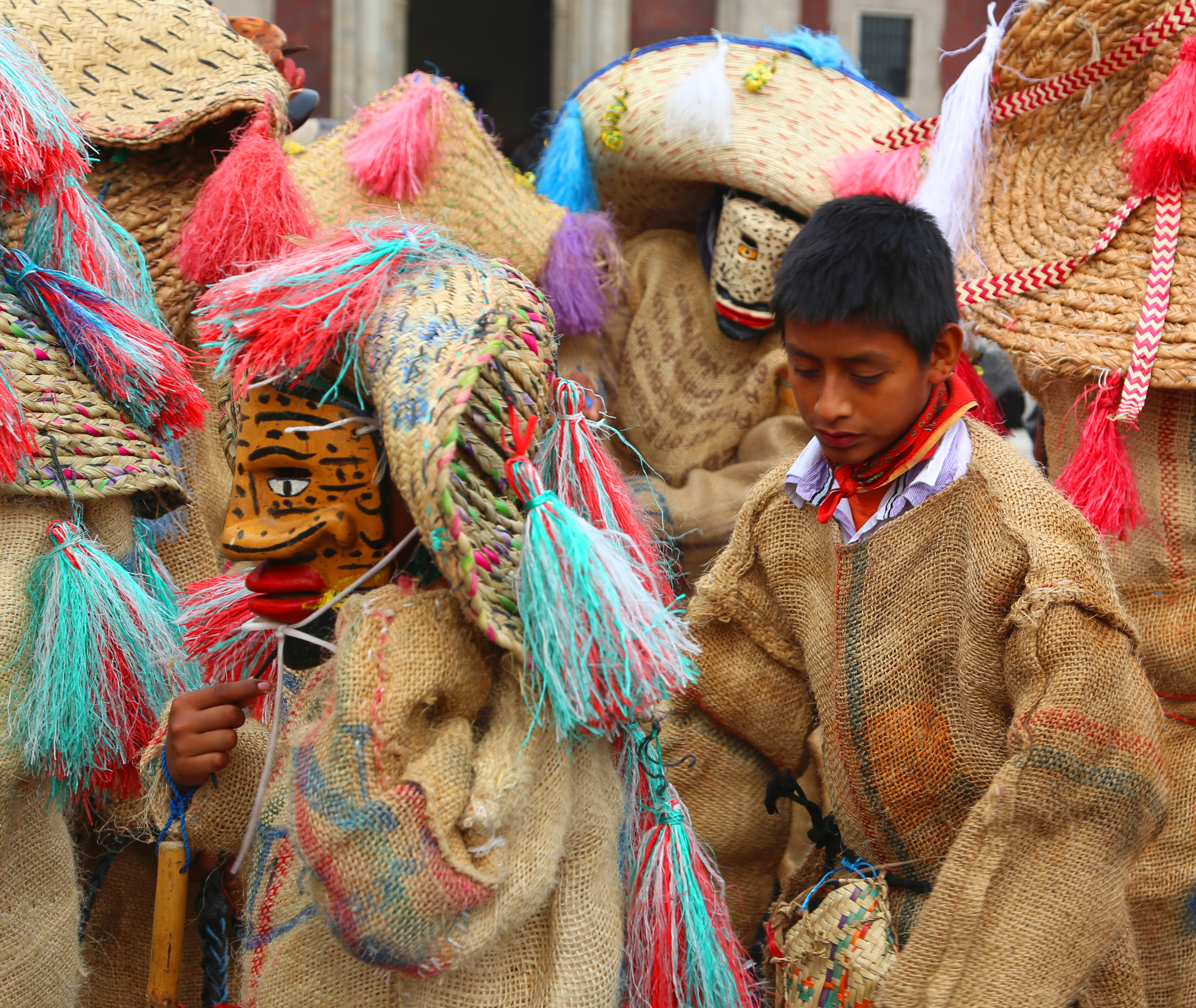 Personajes de la Danza de los Tlacololeros de Zitlala, Guerrero.